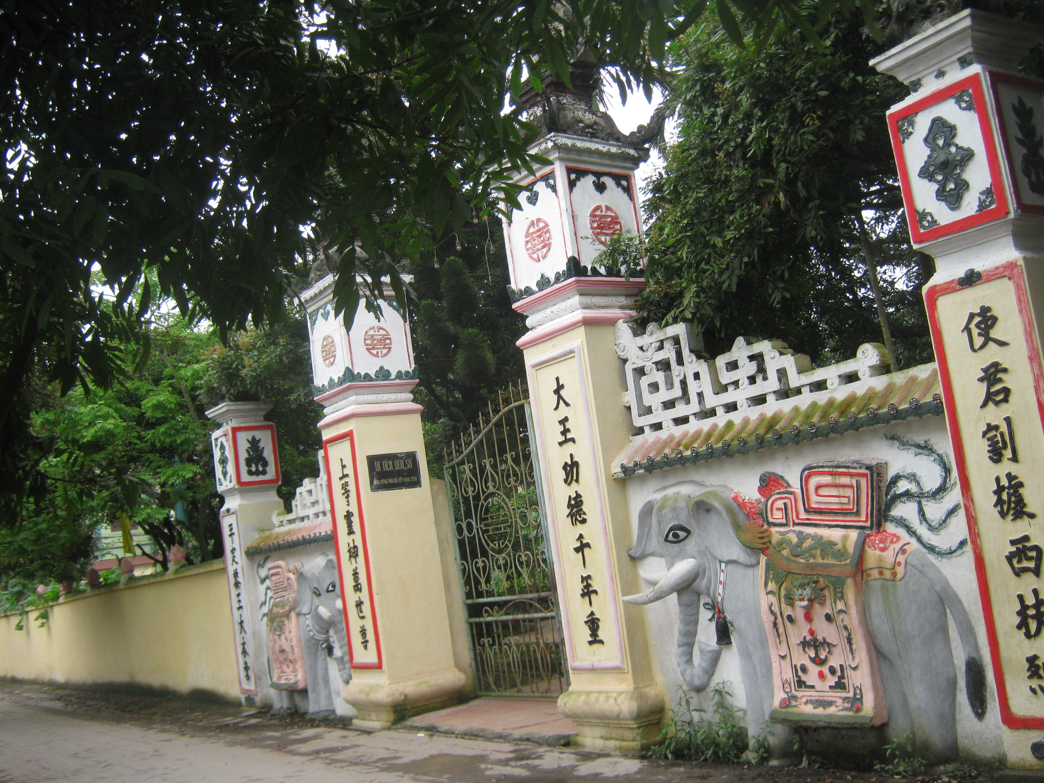 Đình Đông Phù ở Đông Mỹ, Thanh Trì, Hà Nội - Nơi thờ sứ quân Nguyễn Siêu - vị tướng thời vi:12 sứ quân